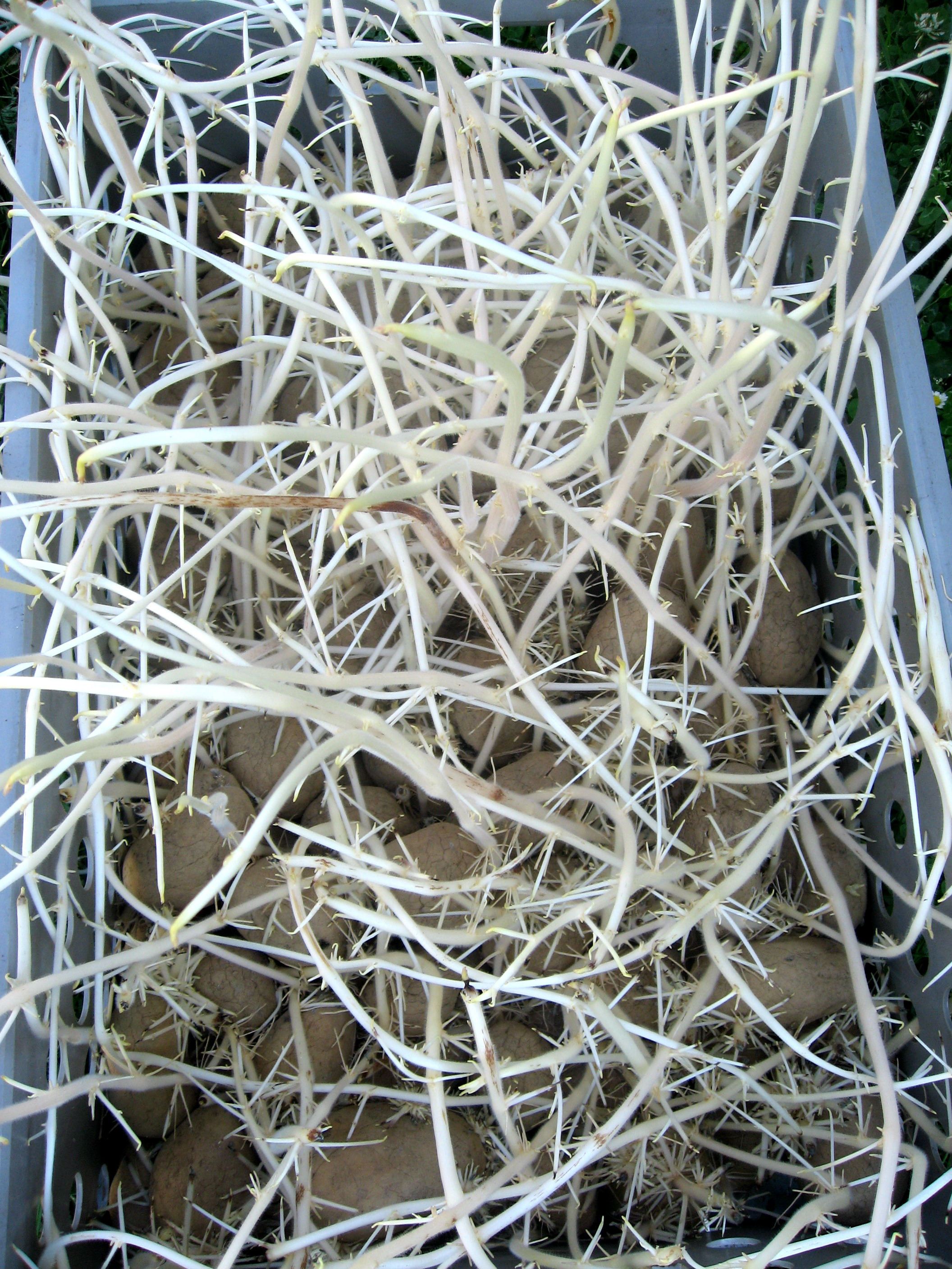 Naklíčené brambory